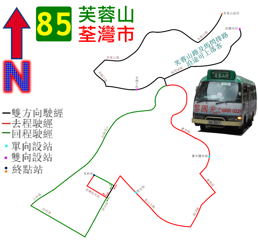 中文（香港）: 新界專線小巴85線的走線圖